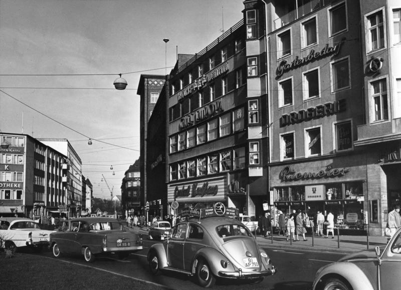 Stadtaufnahmen Bielefeld Jahnplatz in Bielefeld Information added by Wikimedia users.